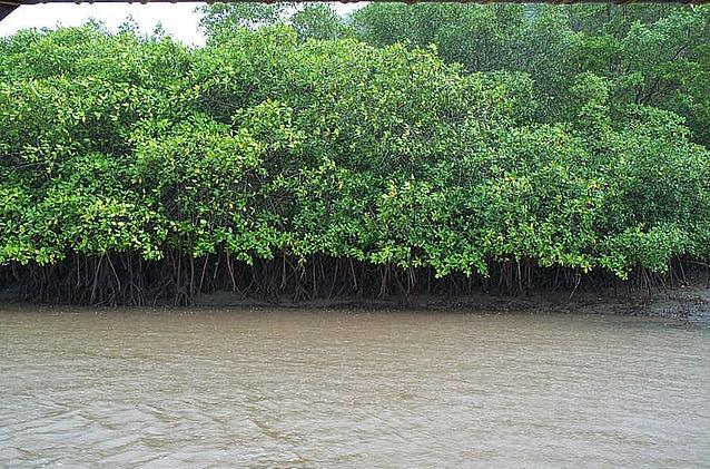 Manglar de Tamarindo, Río Matapalo, Tamarindo, Guanacaste, Costa Rica. In Las Baulas National Marine Park.